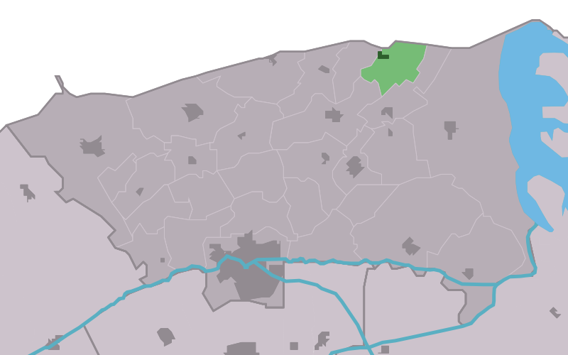 Kaartsje fan himrik fan Paezens